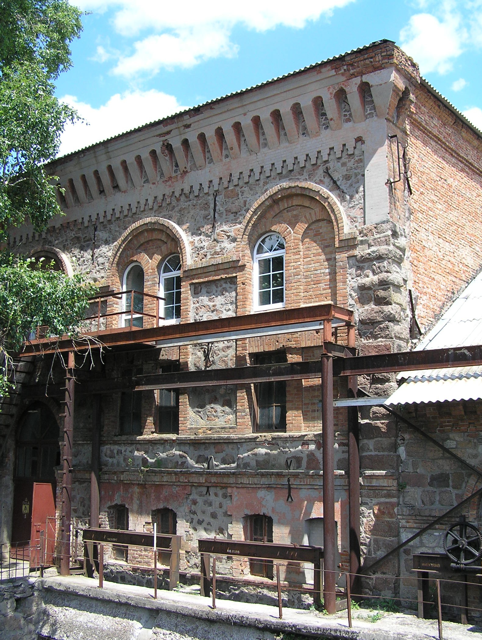 Mygia_power.jpg: Mygia electric station